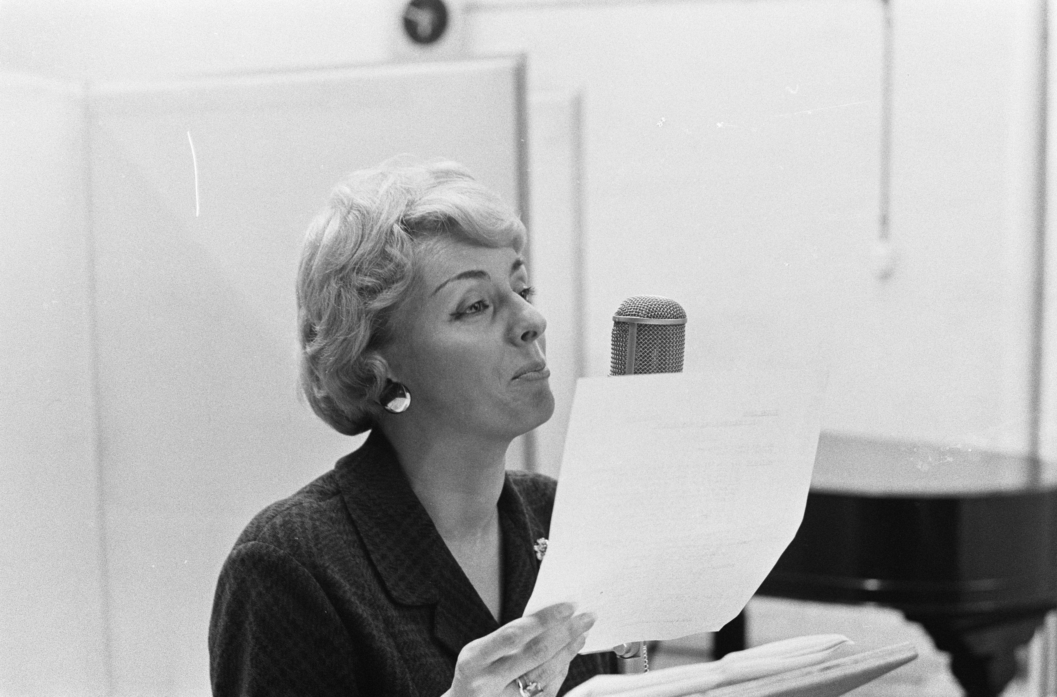 Collectie / Archief : Fotocollectie Anefo Reportage / Serie : [ onbekend ] Beschrijving : Annie Palmen heeft in de Phonogramstudio te Hilversum het uitgekozen Eurovisie Songfestivalliedje opgenomen Datum : 5 februari 1963 Locatie : Hilversum Trefwoorden : artiesten, muziekstudios, opnamen, songfestivals Persoonsnaam : Palmen, Annie Fotograaf : Gelderen, Hugo van / Anefo Auteursrechthebbende : Nationaal Archief Materiaalsoort : Negatief (zwart/wit) Nummer archiefinventaris : bekijk toegang 2.24.01.05 Bestanddeelnummer : 914-7879